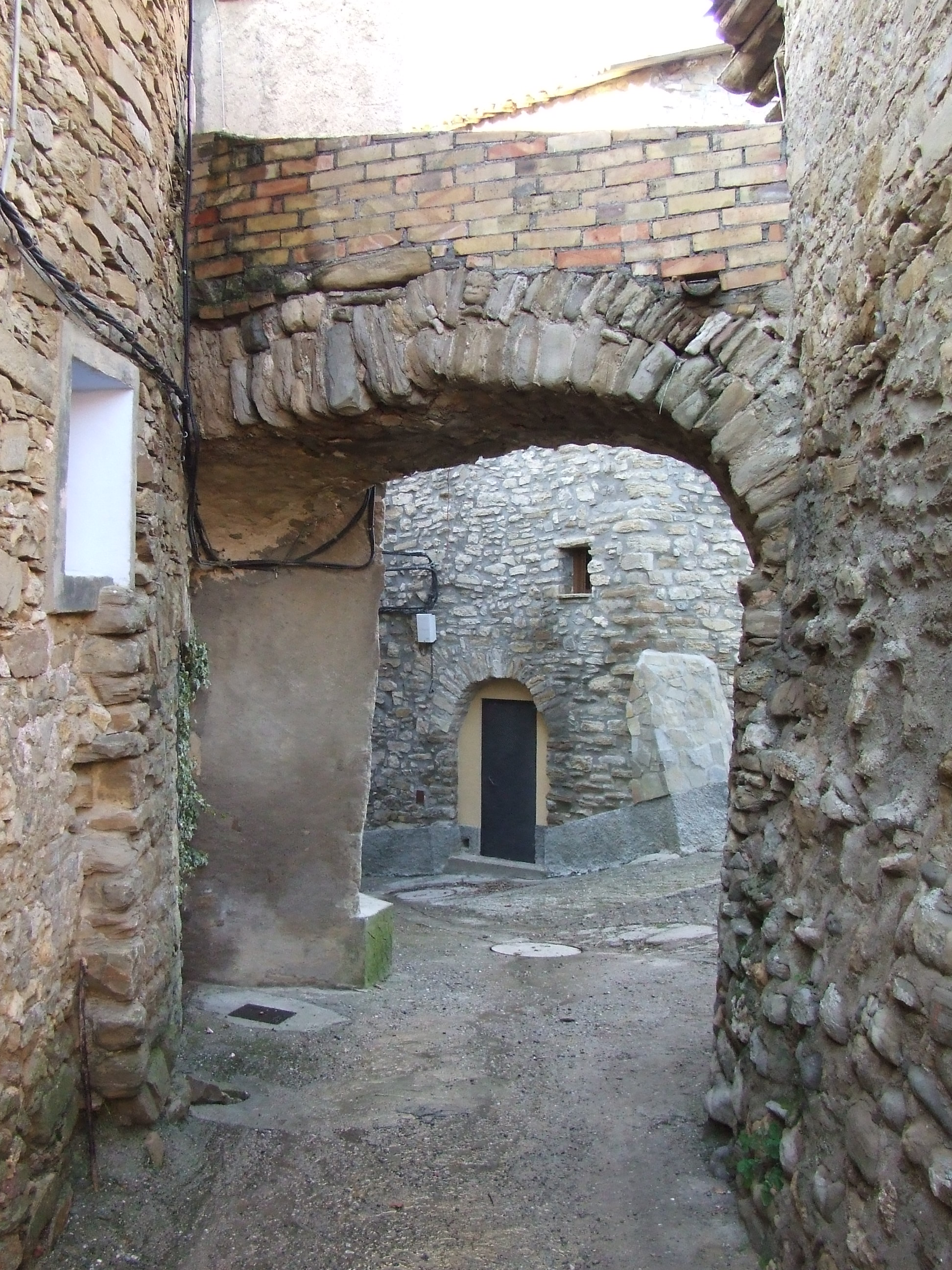 Portal del poble clos de Sant Serni (Gavet de la Conca, Pallars Jussà)